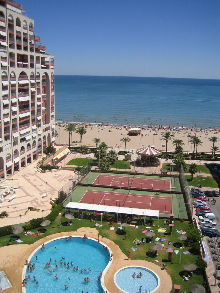 Complejo residencial Torres de San Antonio, "Ferrobús", en la playa de Cullera.